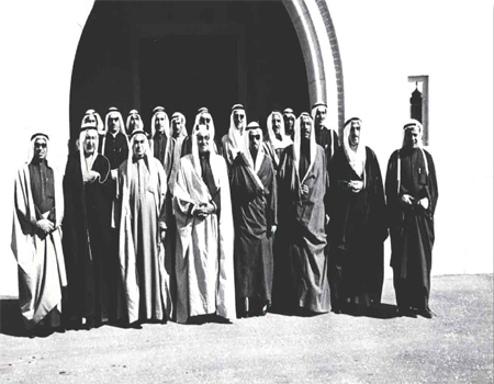 التشكيل الوزاري الخامس في دولة الكويت. في العام: 1965. The fifth cabinet in the history of Kuwait (1965).